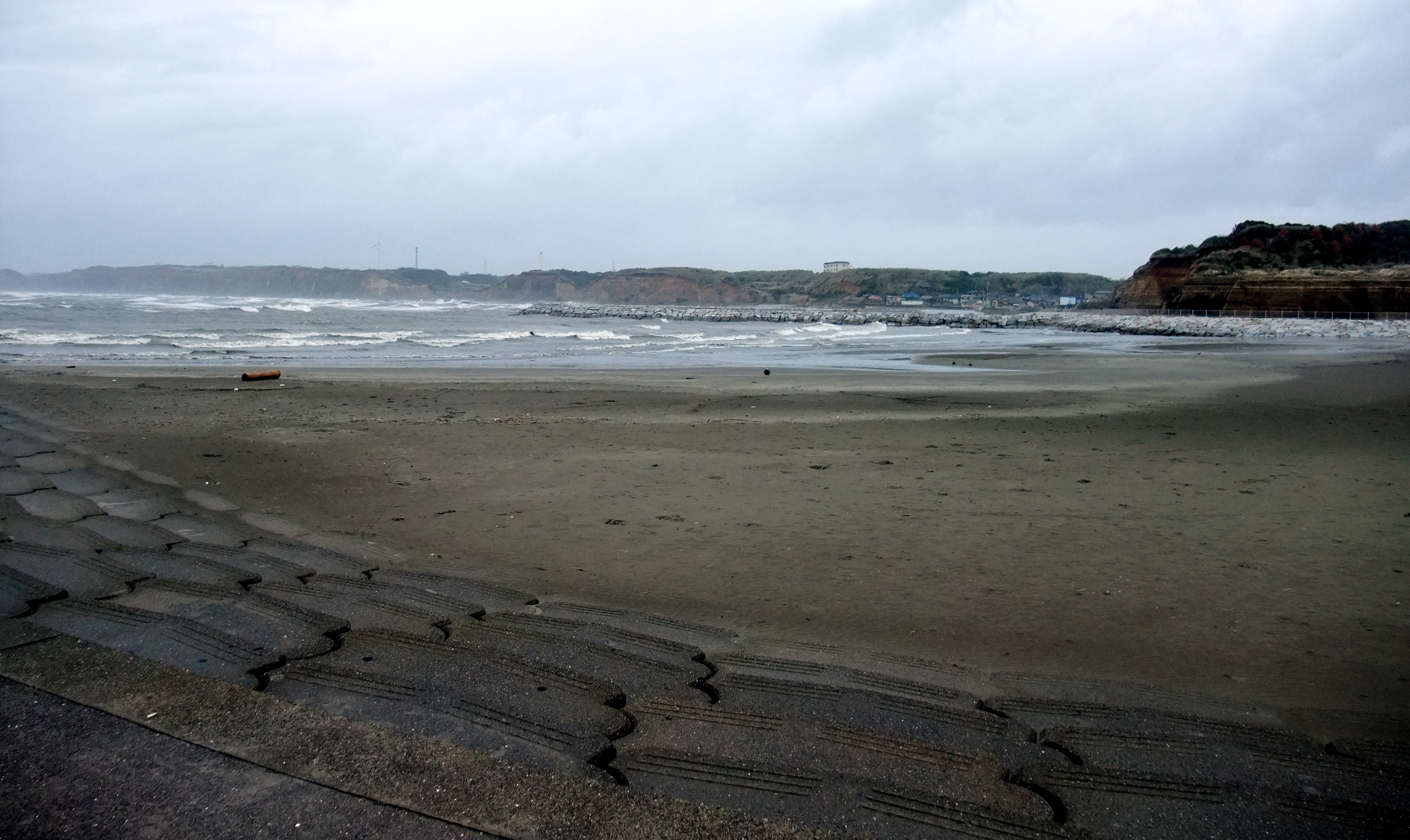 津波で変わってしまった砂浜